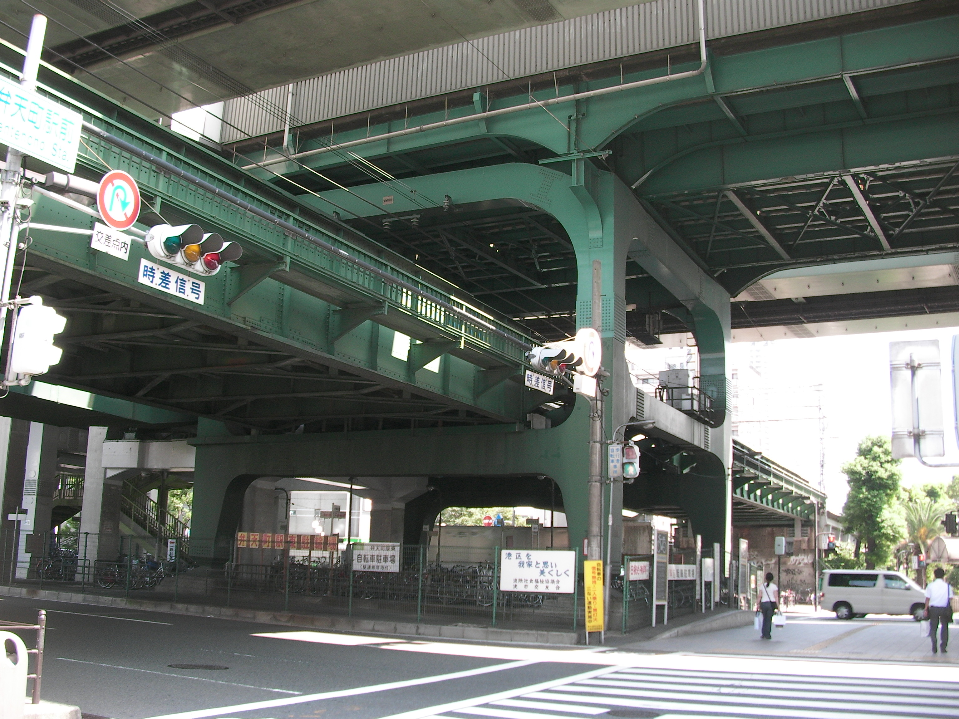 弁天町駅におけるＪＲ環状線（下）と市営地下鉄中央線（上）の立体交差部分。橋脚の共有は交通局側が申し入れ、共同で設計された。